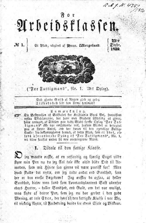 Henrik Wergelands «For Arbeidsklassen» nr.1, 1839.